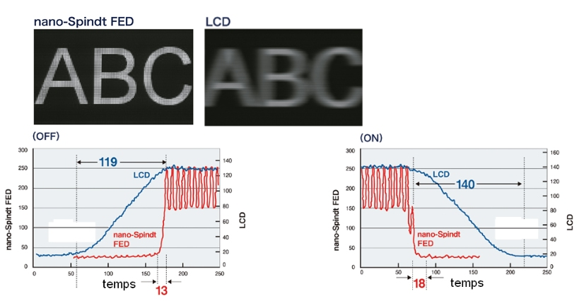 comparativa FED i LCD